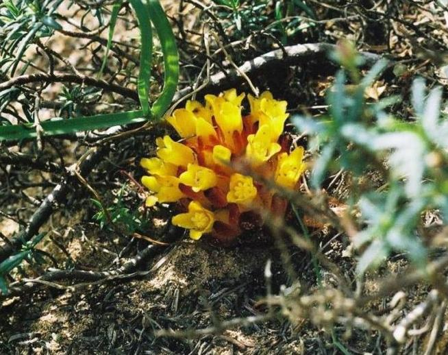 Beschreibung: Cytinus hypocistis von der Südküste Mallorcas Quelle: selber fotografiert Fotograf: Kku, Anfang April 2004 Lizenzstatus: Public Domain